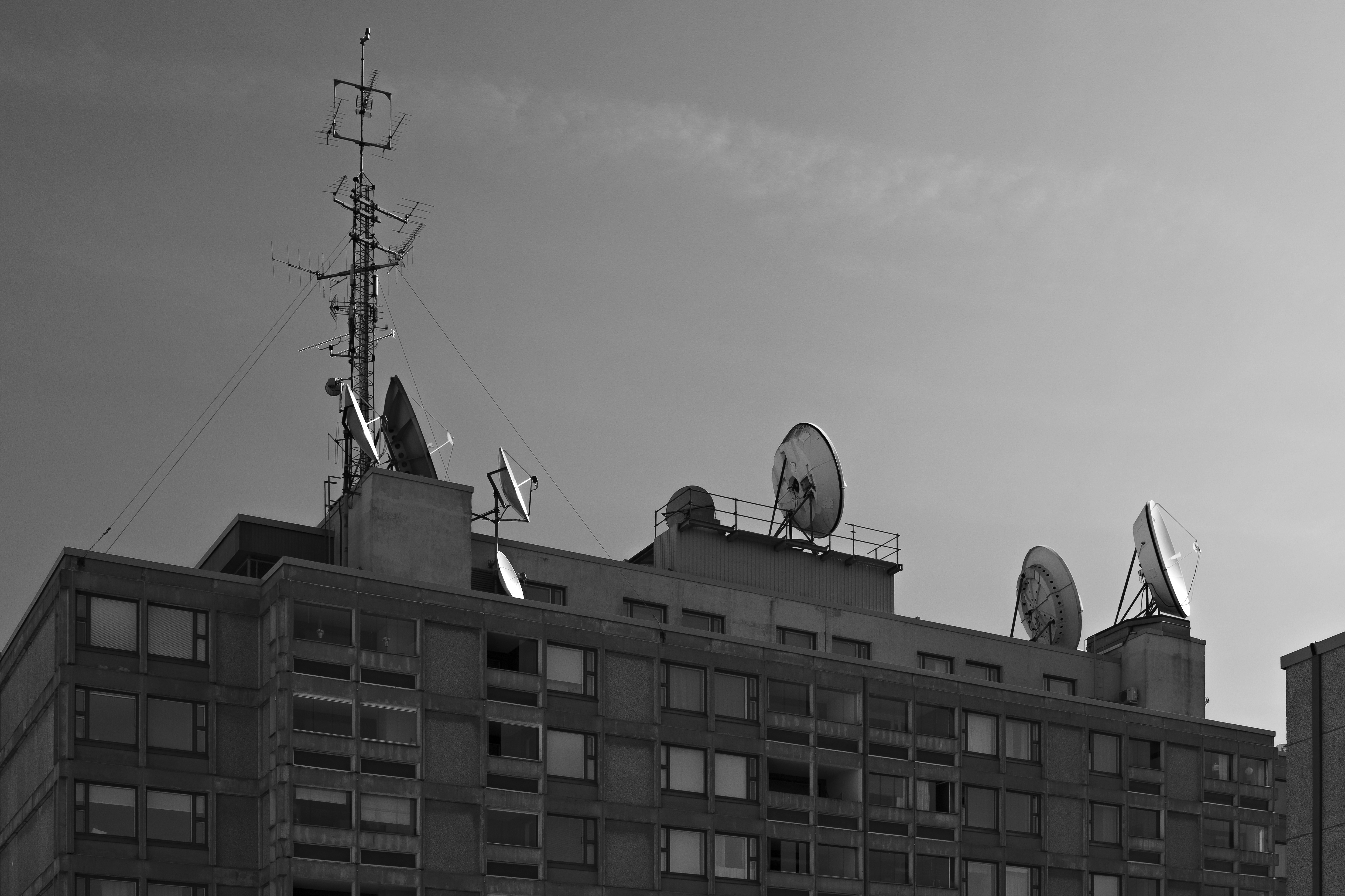 Kiinteistön asuinrakennuksen ylimmät kerrokset nähtynä lännestä, kesällä 2019. Suuret lautasantennit siirsivät satelliittilähetykset kaapeliverkkoon alkaen vuonna 1982, ensimmäisenä koko Euroopassa. Antenni-tason alla on asuinrakennuksen uima-allas ja sauna-osastot.